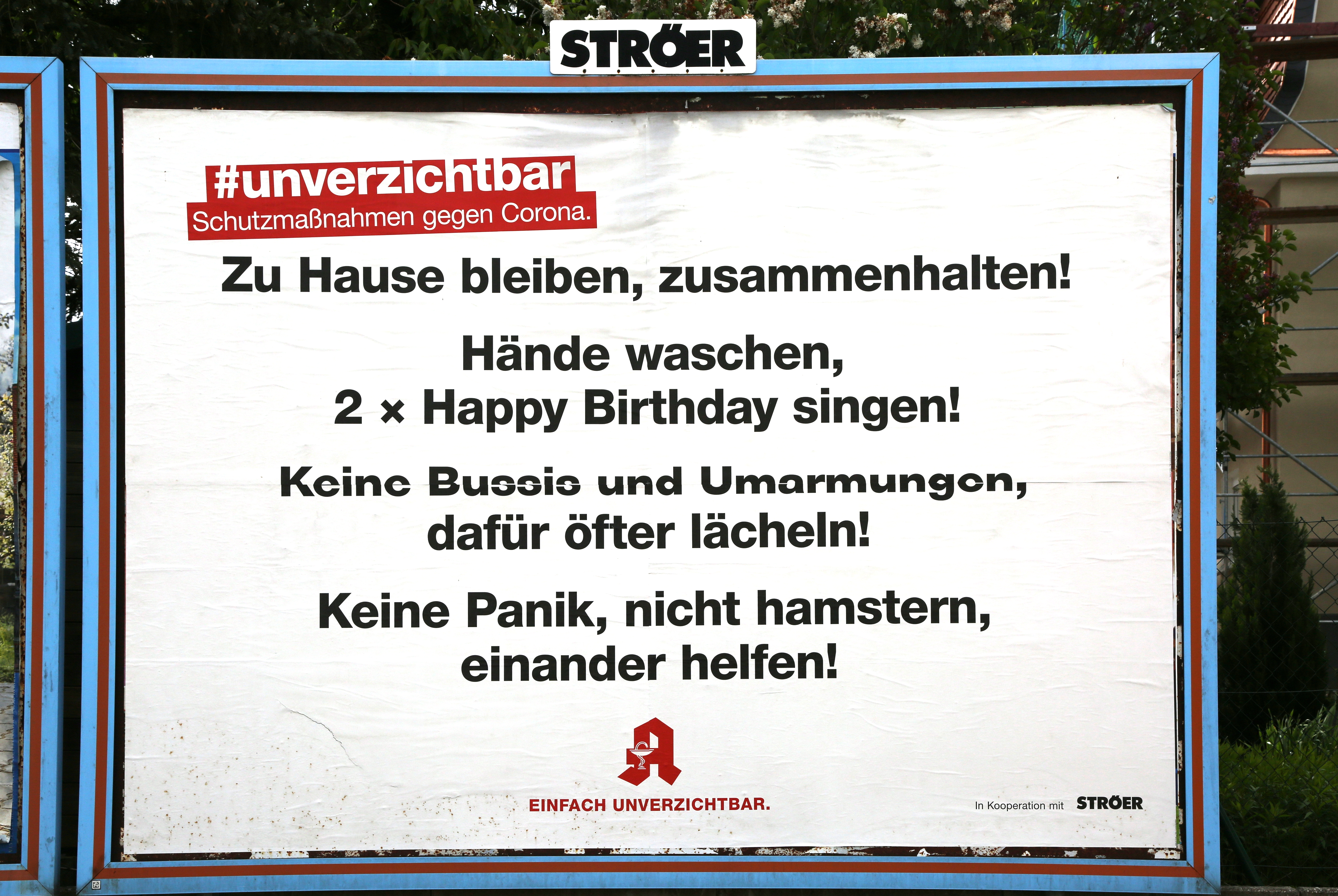 Corona-Empfehlungen, Plakat des Apothekenverbands